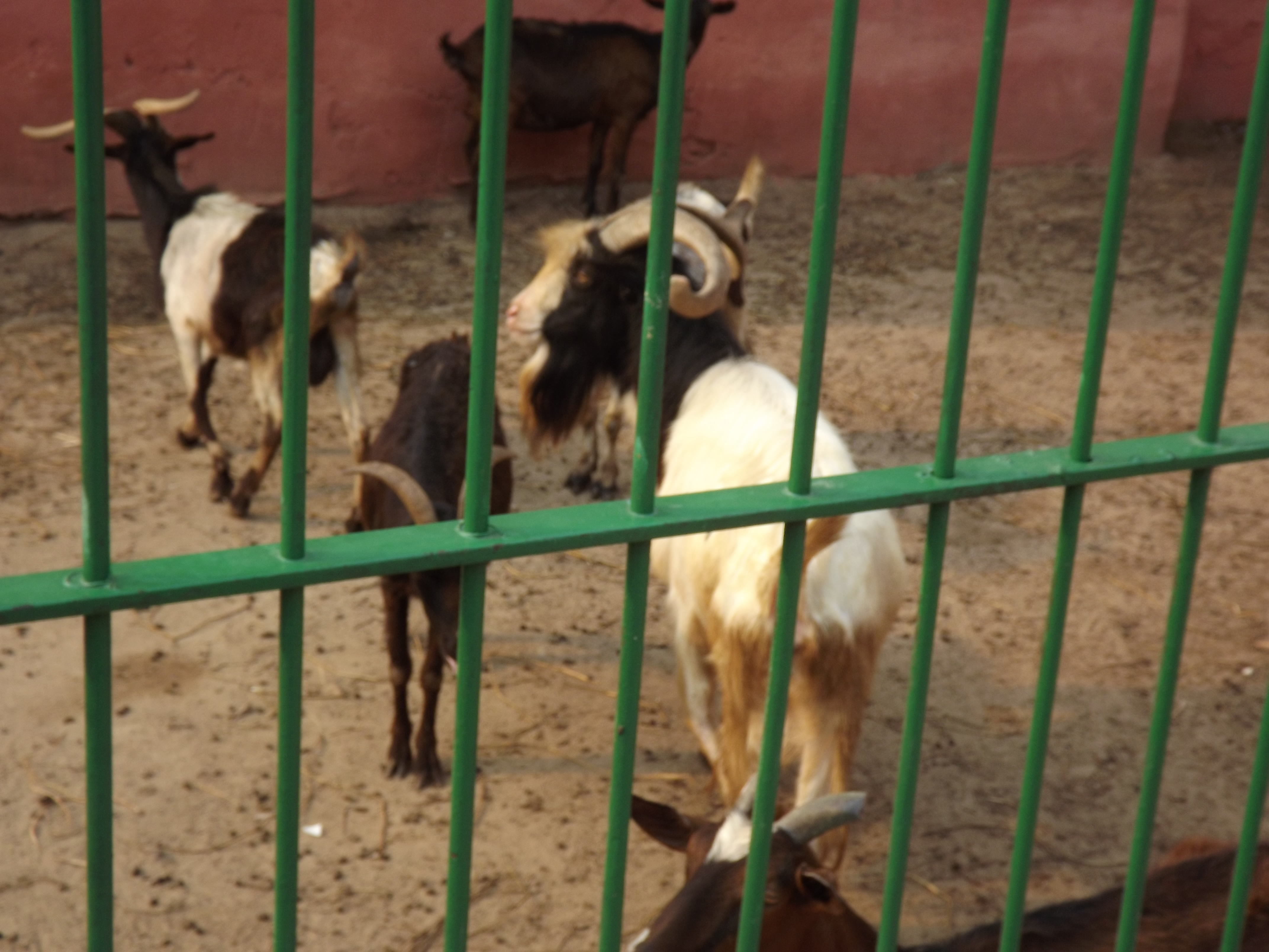 ماعز اسيوي في حديقة حيوان النزهة - الاسكندرية